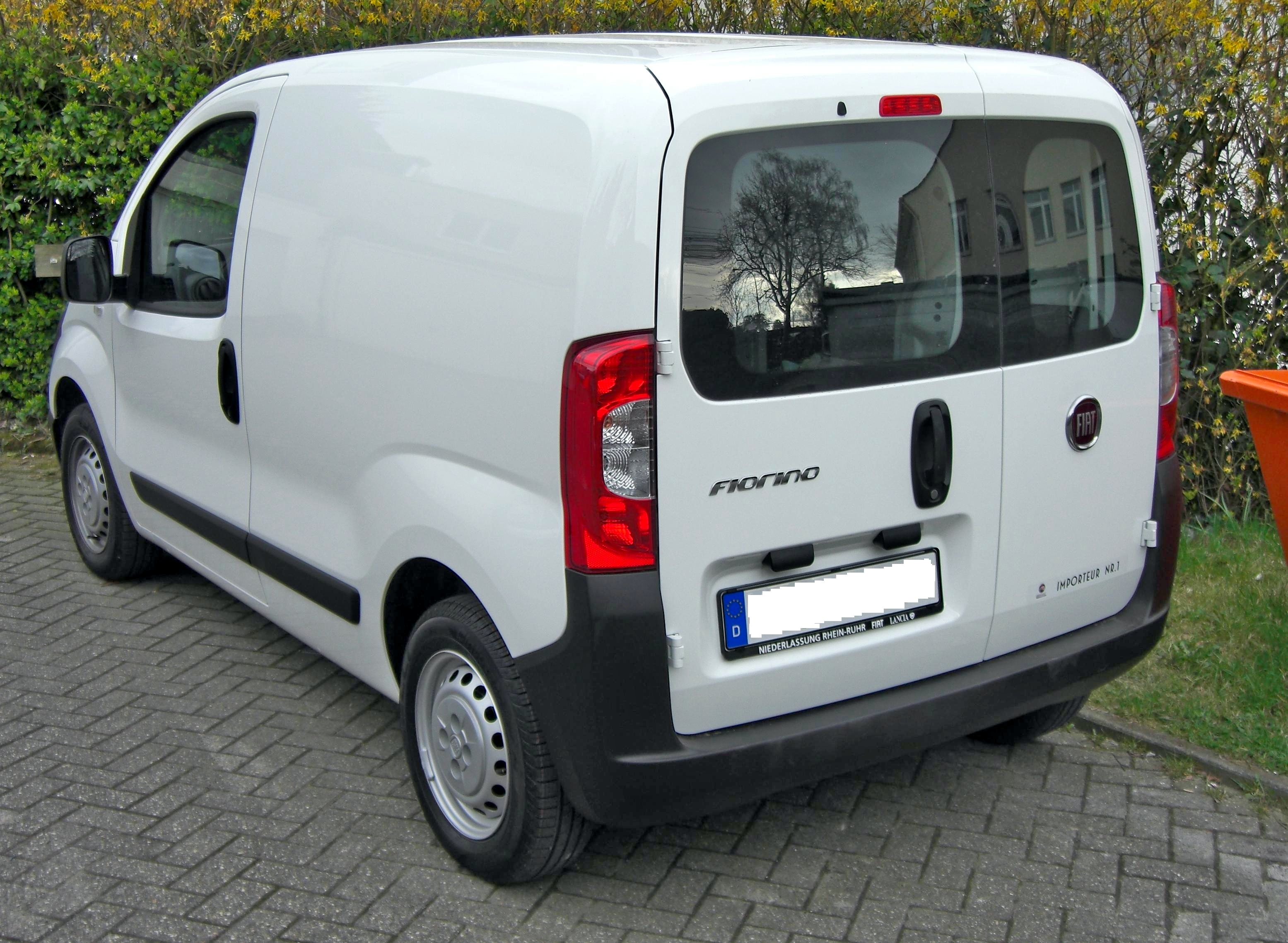 Fiat Fiorino 2008